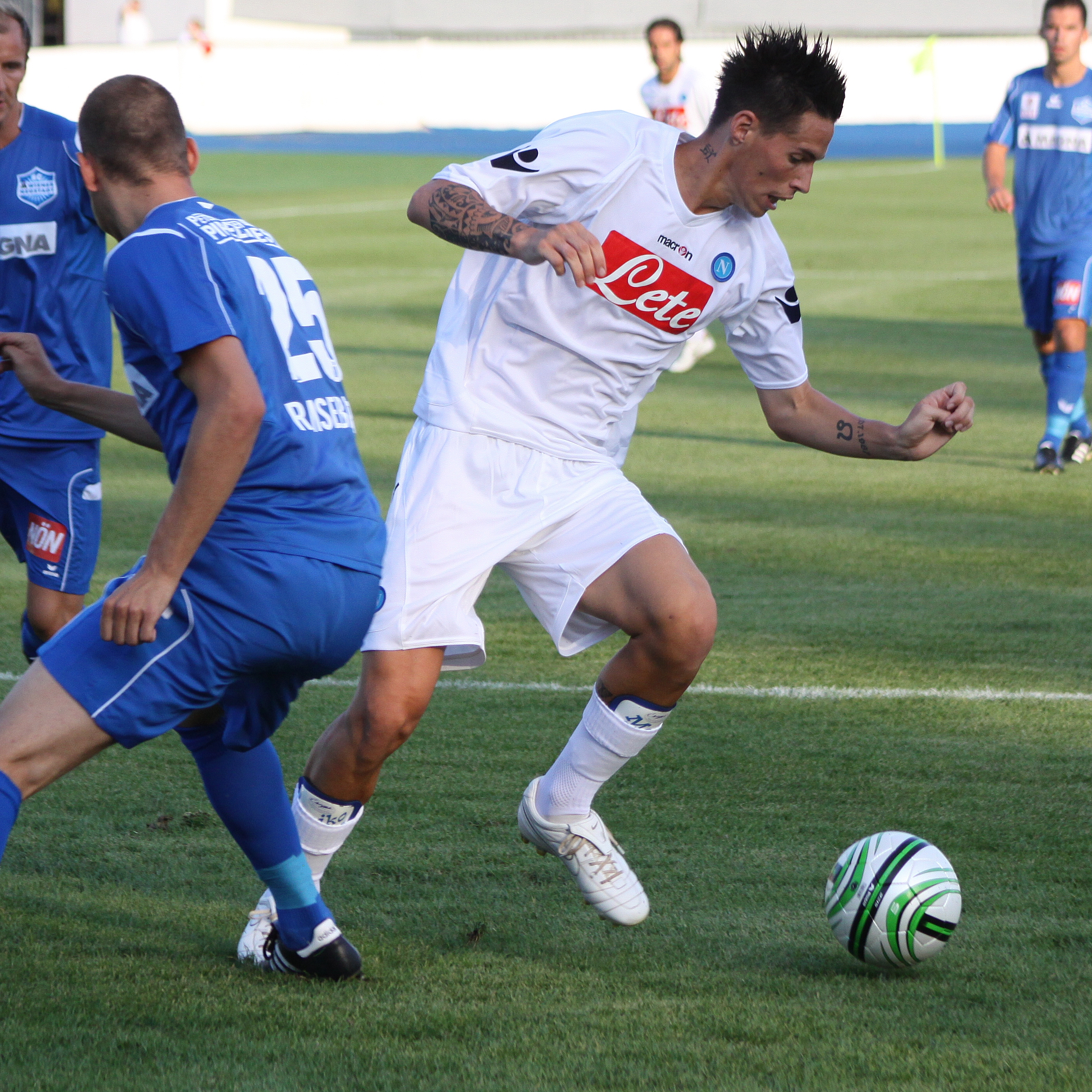 Marek Hamšík - SSC Neapel (4) Marek Hamšík - Società Sportiva Calcio Napoli